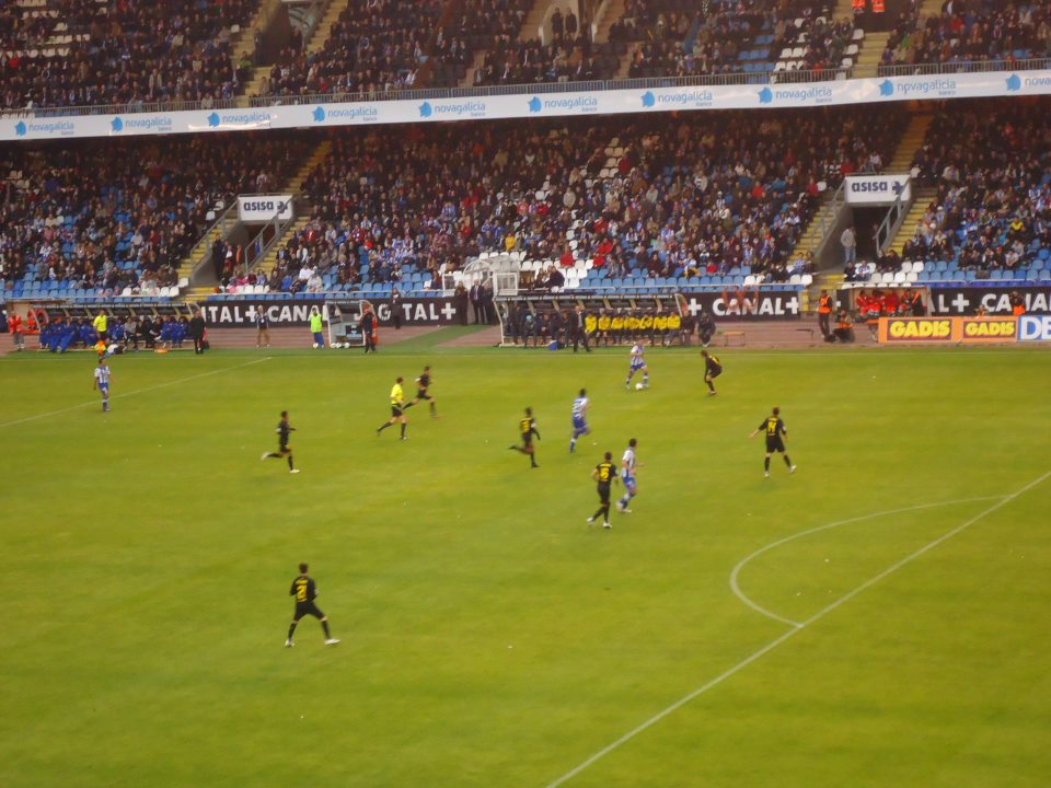 Partido Deportivo - Barcelona B